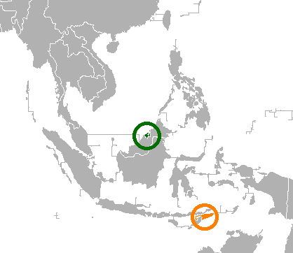 Localization of Brunei and East Timor